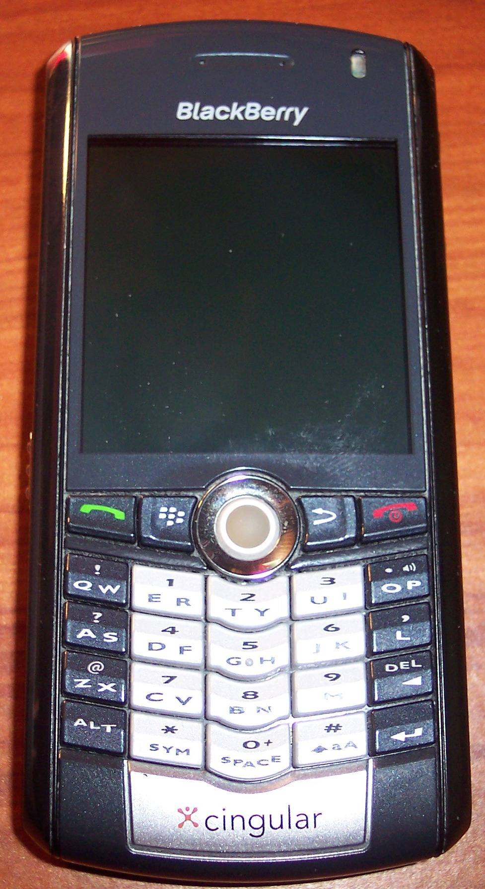 Photo taken by myself, joebengo